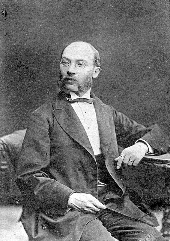 Marko Zamenhof, Warschau 1878. Porträtfoto des Vaters von Ludwik Lazar Zamenhofs, des Erfinders der Sprache Esperanto